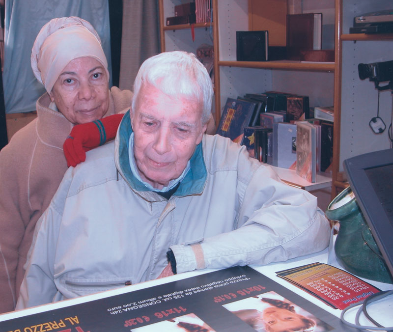 Jacqueline con suo marito, Victor